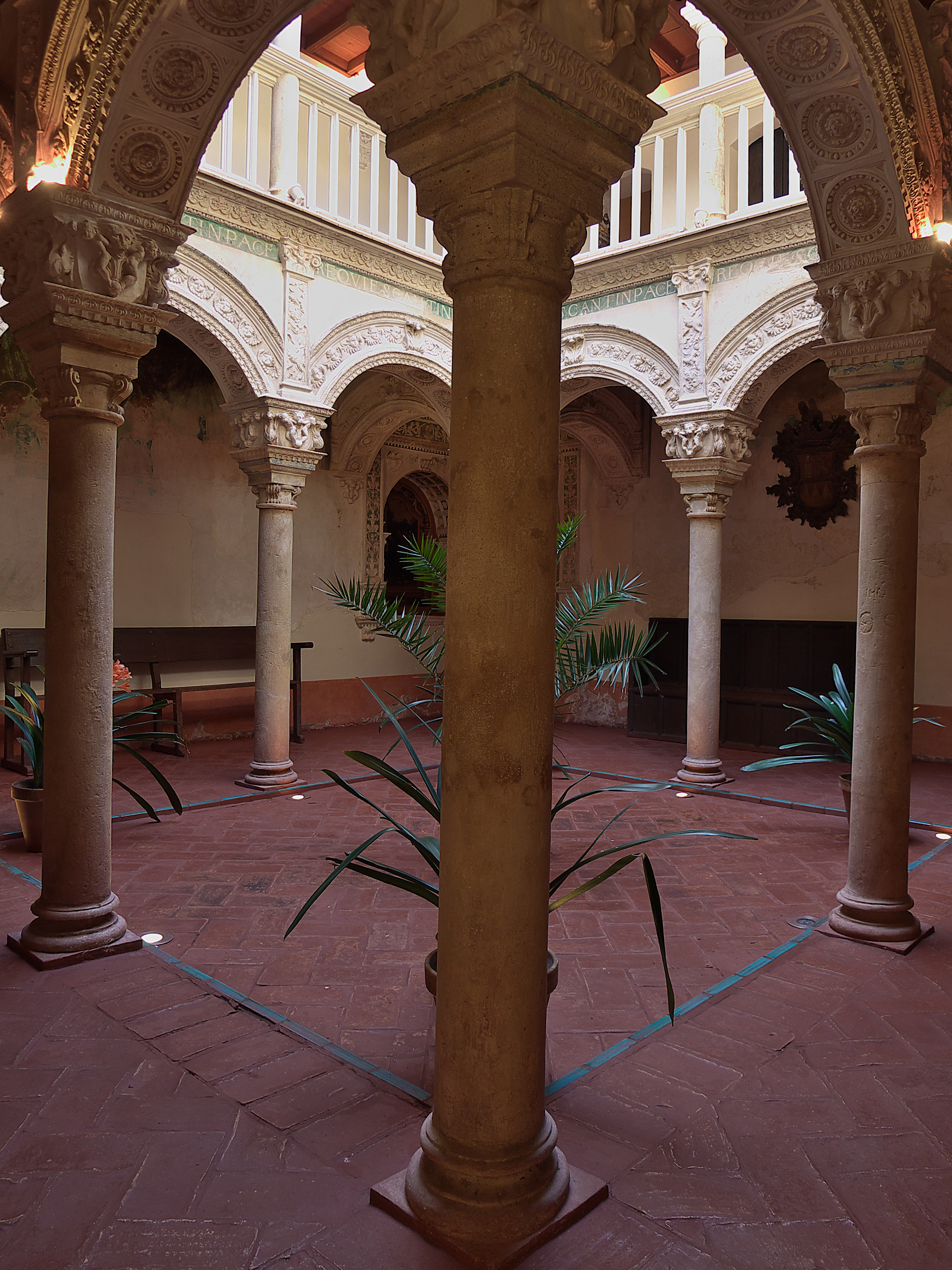 Primera mitad del XVI (1544-1555). Entre los más importantes patios del renacimiento español. Pedro Téllez-Girón y de la Cueva, I Duque de Osuna (1562-1590), Virrey de Nápoles; Pedro Téllez-Girón y Velasco, III Duque de Osuna (1600-1624), Virrey de Nápoles; Juan Téllez-Girón Enríquez de Ribera, IV Duque de Osuna (1624-1656), Virrey de Nápoles y Gaspar Téllez-Girón y Sandoval, V Duque de Osuna y gobernador de Milán (1670-1674), aportaron a la Colegiata el arte y la arquitectura italiana.